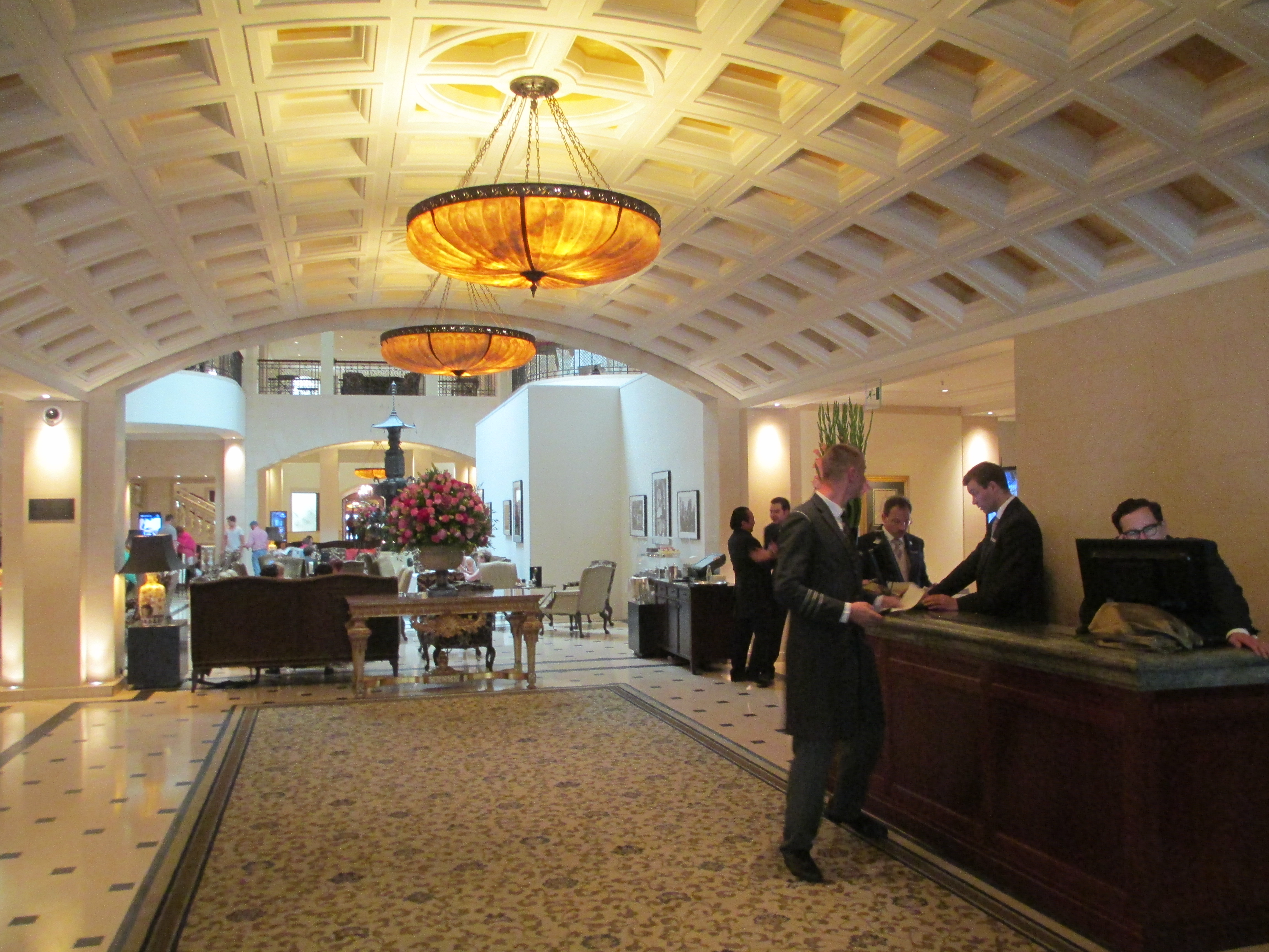 הלובי של מלון אדלון בברלין